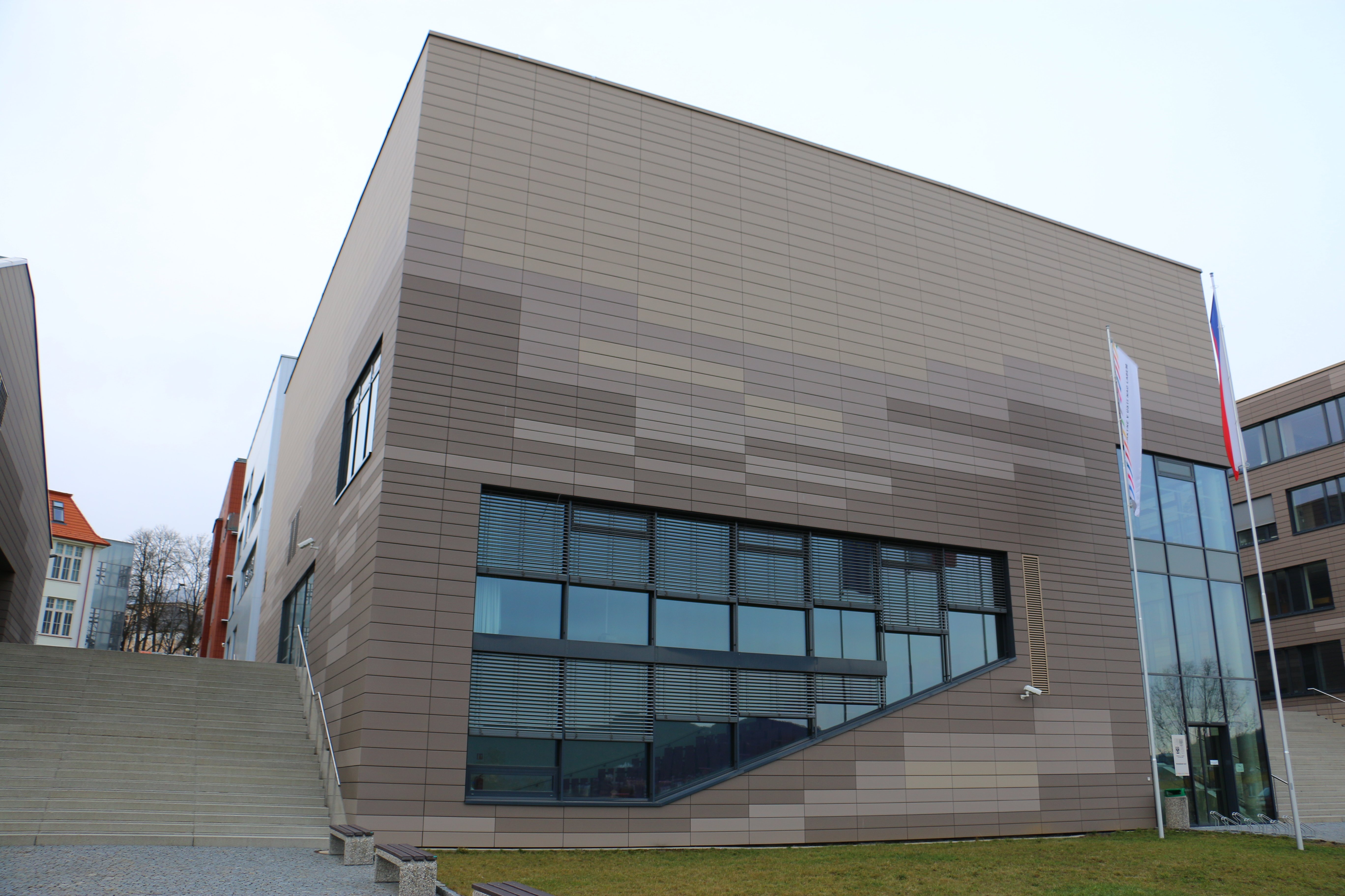 Rektorát UJEP